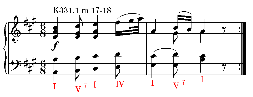 Analiza muzicala progresie cadenta.